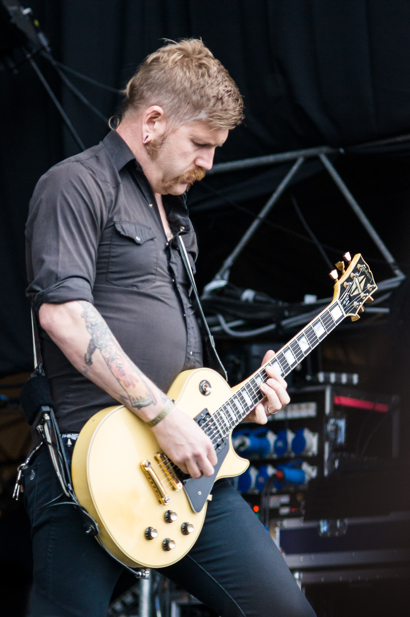 Bill Kelliher - gitarzysta zespołu Mastodon podczas koncertu na festiwalu Ursynalia 2012.